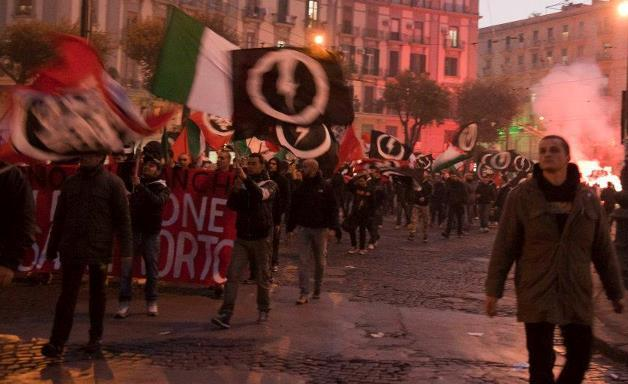 Manifestazione in difesa dell'economia nazionale, Napoli 2011